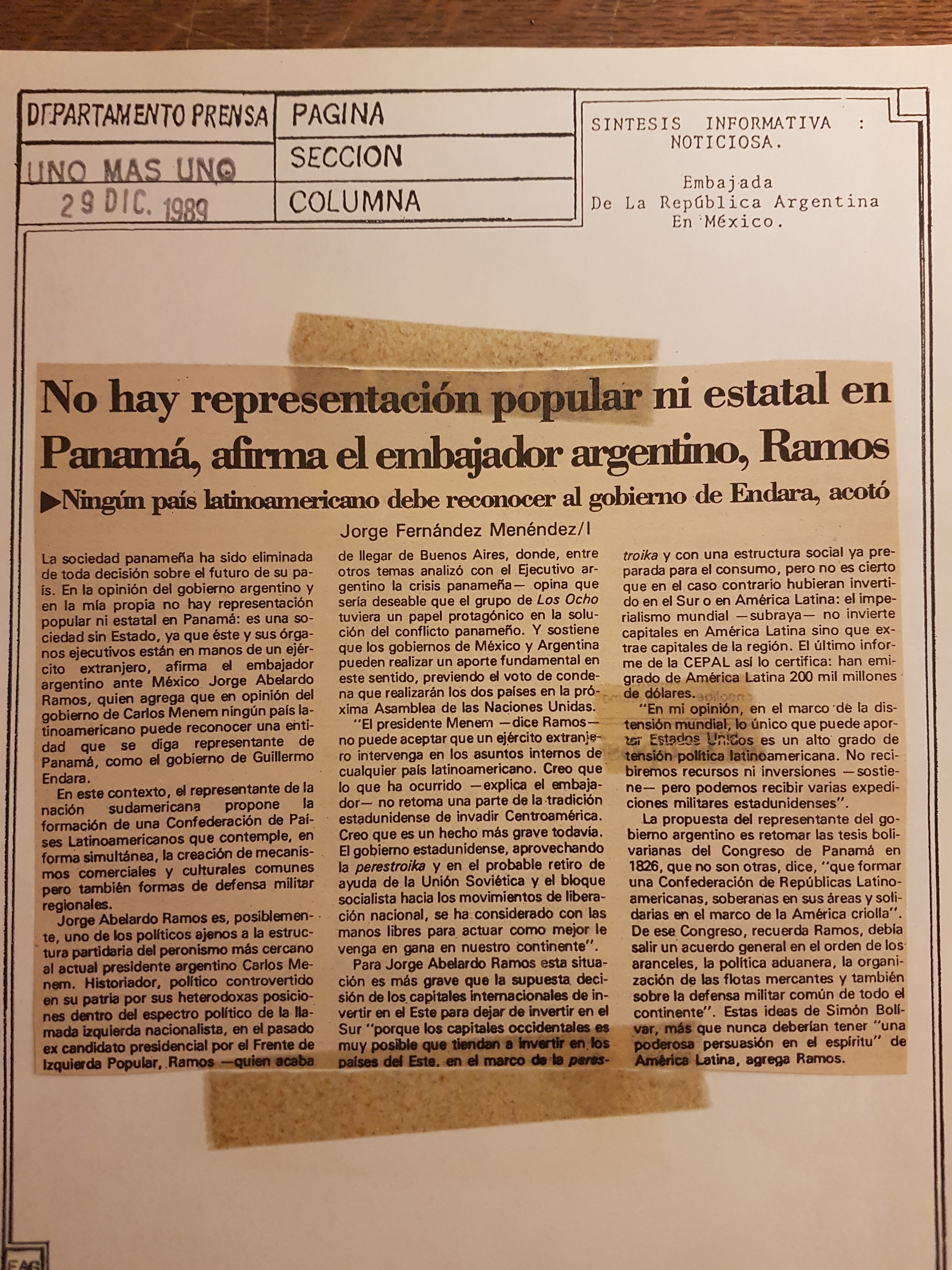 El Embajador Ramos, repudia al imperialismo de EEUU